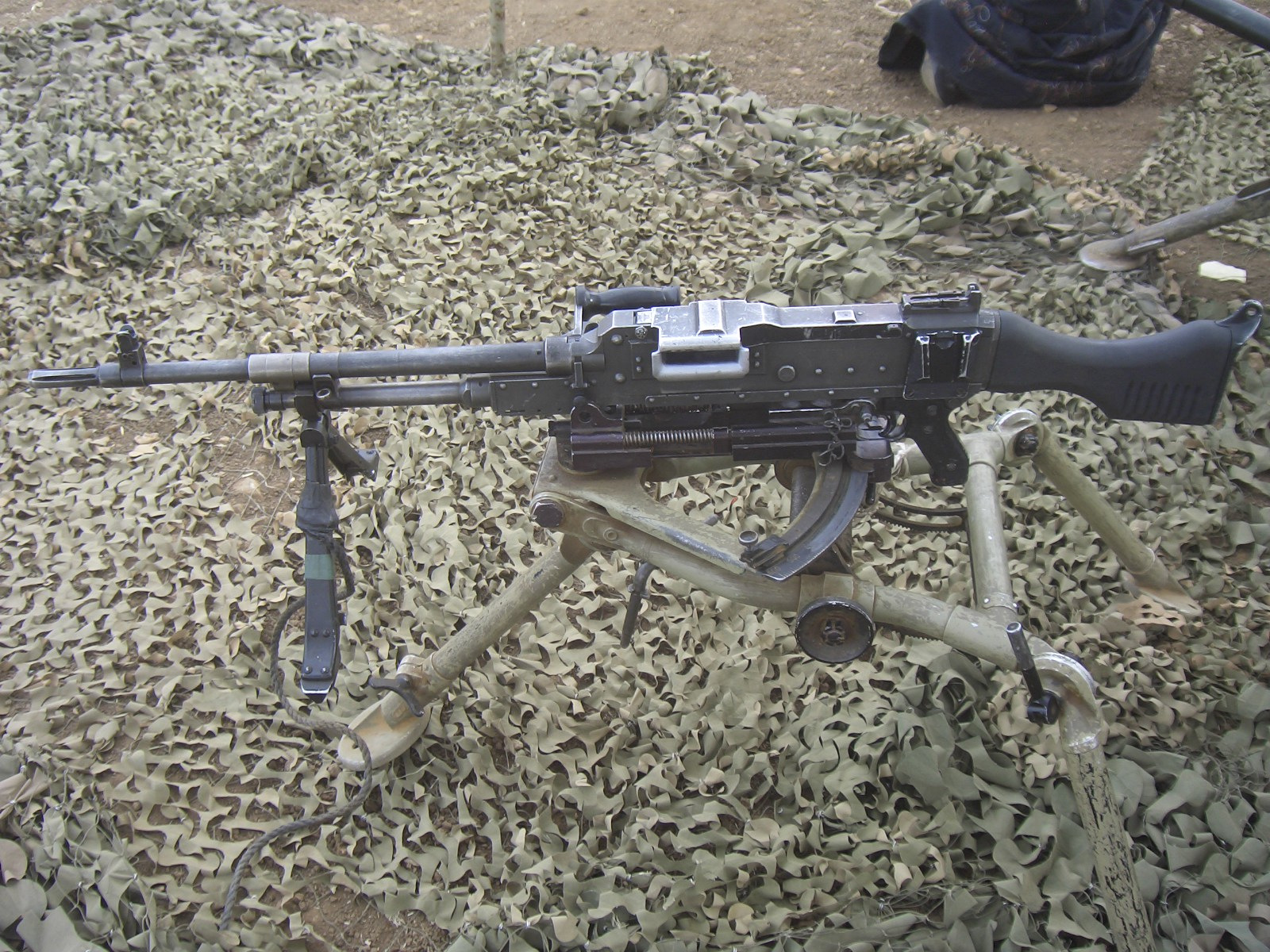 מאג